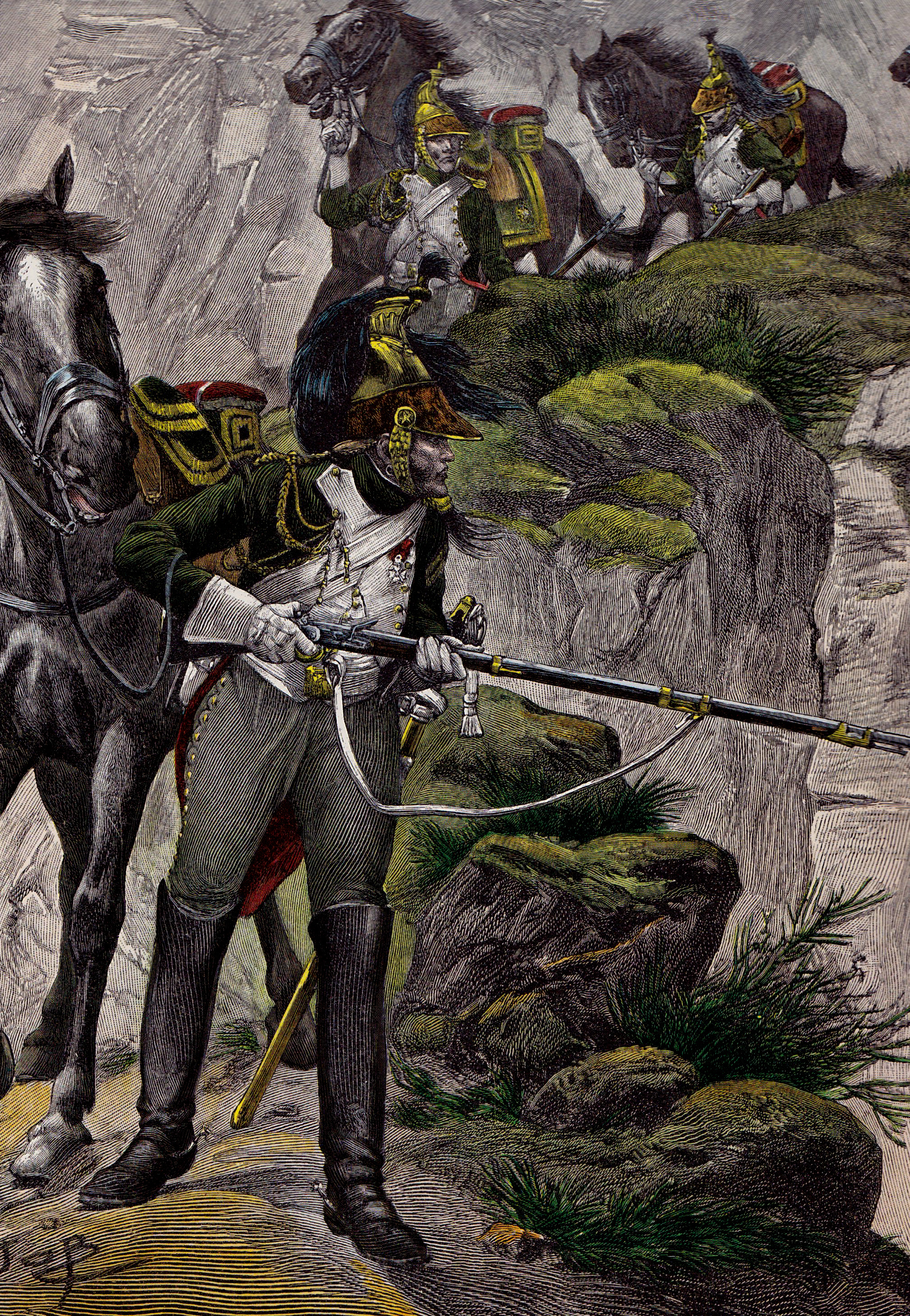 Dragons de la Garde impériale en reconnaissance, lors de la bataille de Somosierra (30 novembre 1808).